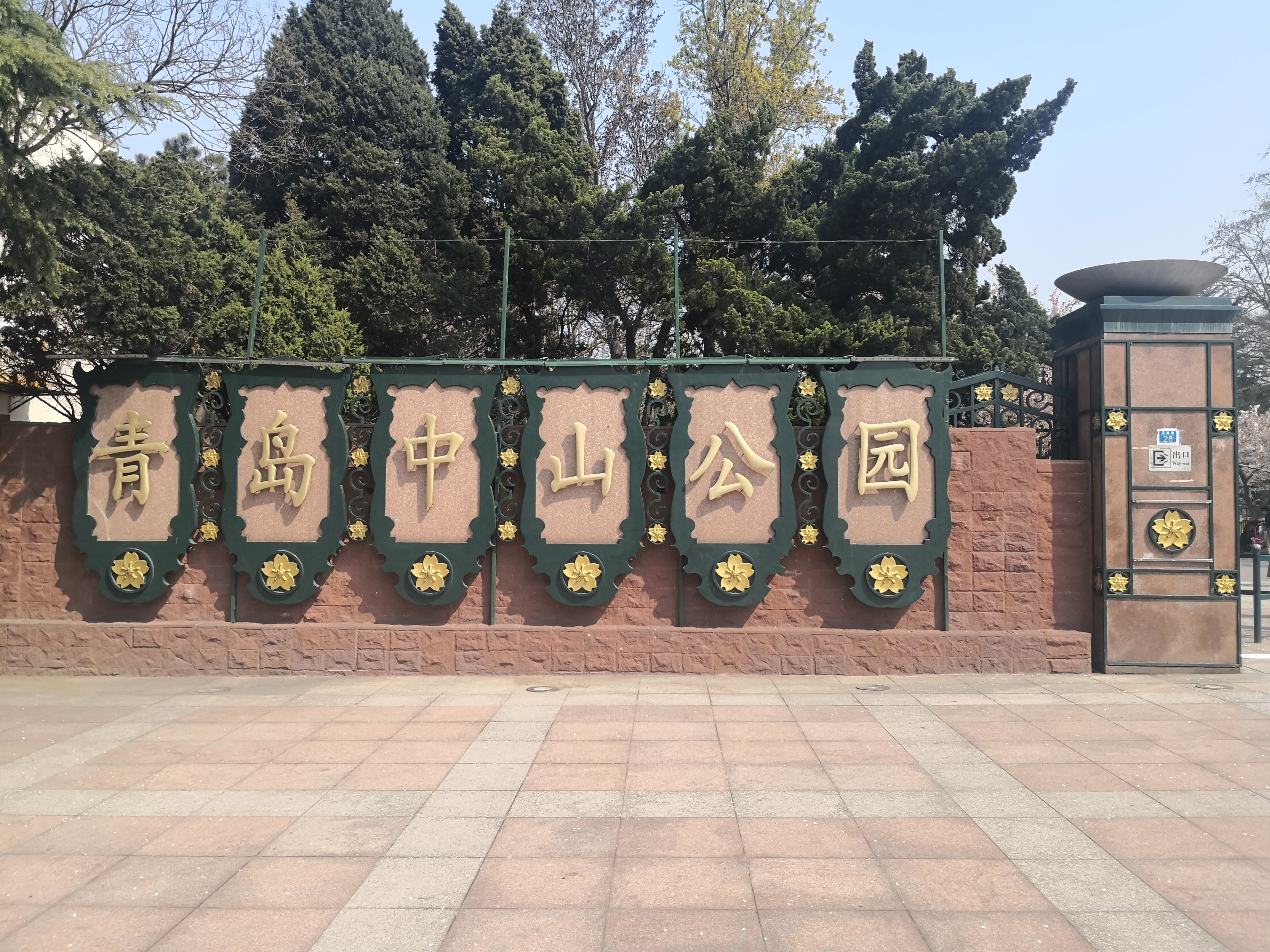 青岛中山公园南门